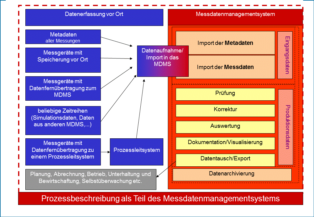 Übersicht der Datenerfassung und Verarbeitung